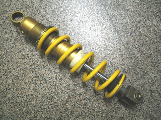 Ammortizzatore motociclistico